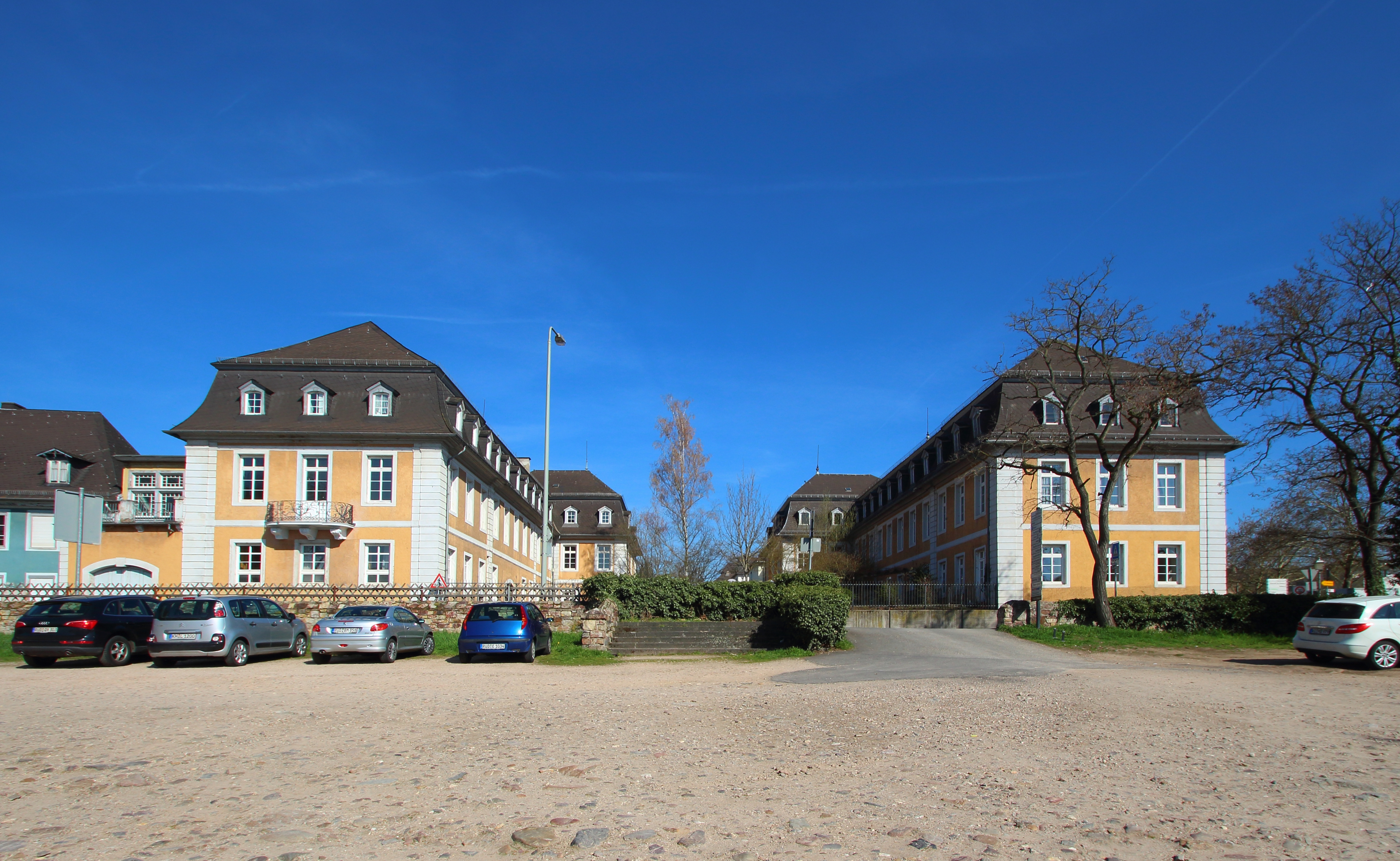 Palais Ostein, Geisenheim am Rhein, Rheingau.